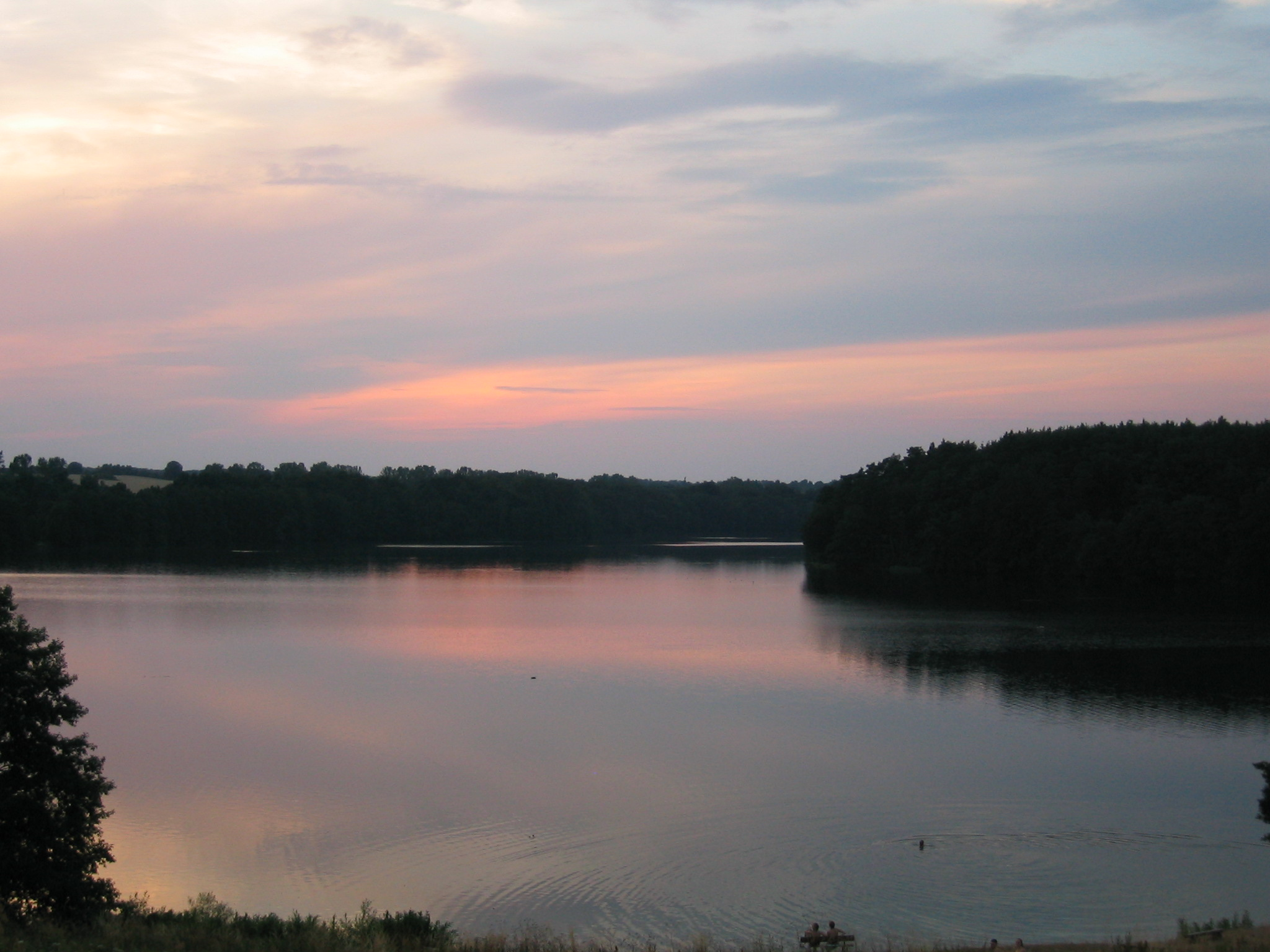 Der Schmale Luzin von der Badestelle in Carwitz aus fotografiert.